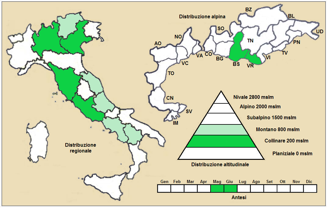 Stipa pulcherrima vrietà pulcherrima - Distribuzione italiana